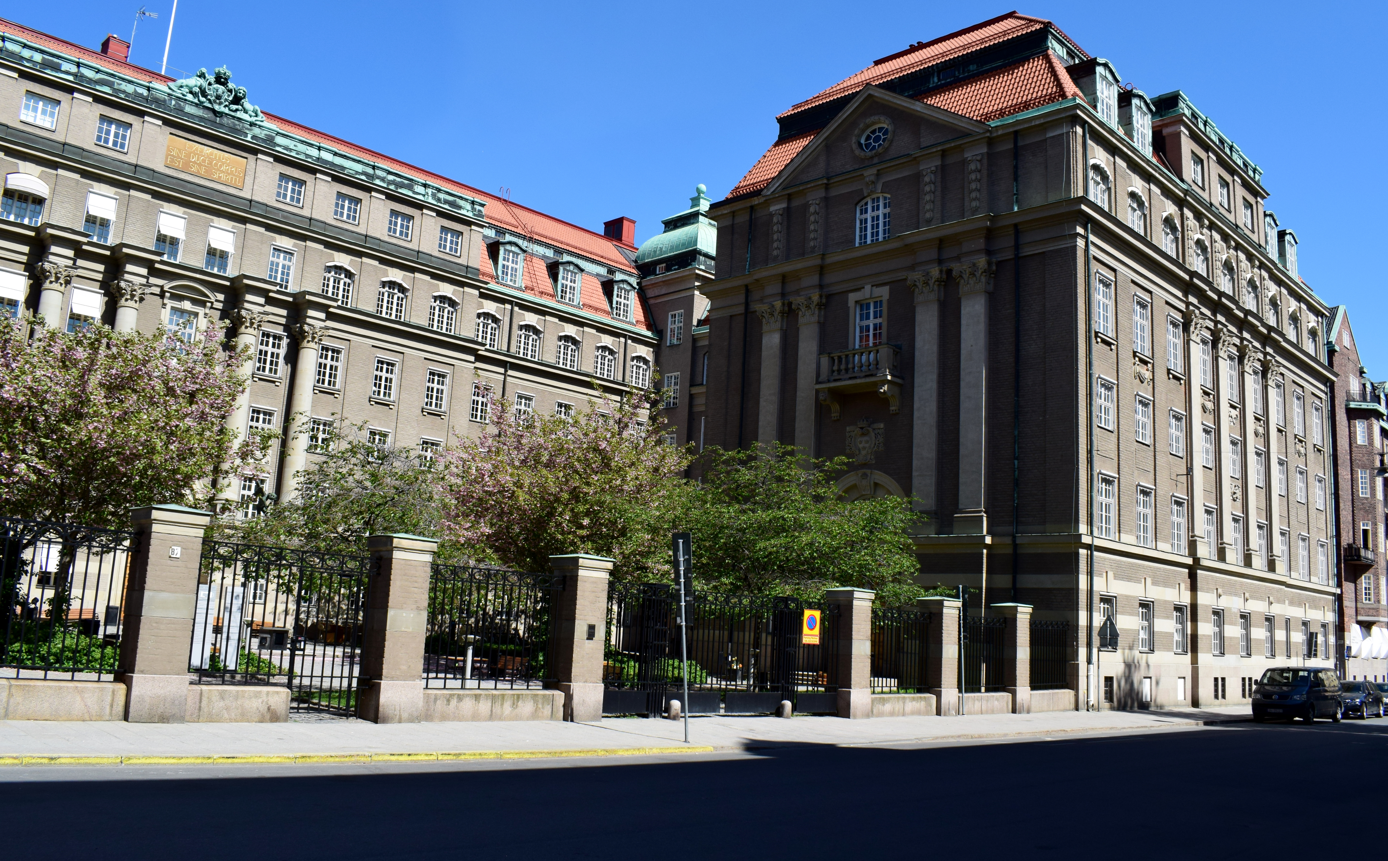 Östermalmsgatan 87, Gamla militärstabsbyggnaden (GMSB) eller Grå huset. Stabsplats för Försvarsstaben och Arméstaben åren 1937–1981.